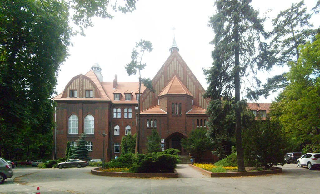 Poznań, Szpital im. H. Święcickiego; wejście C